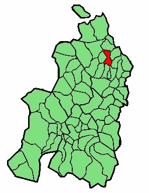 aipaturiko udalerriaren kokapena Nafarroa Beherean